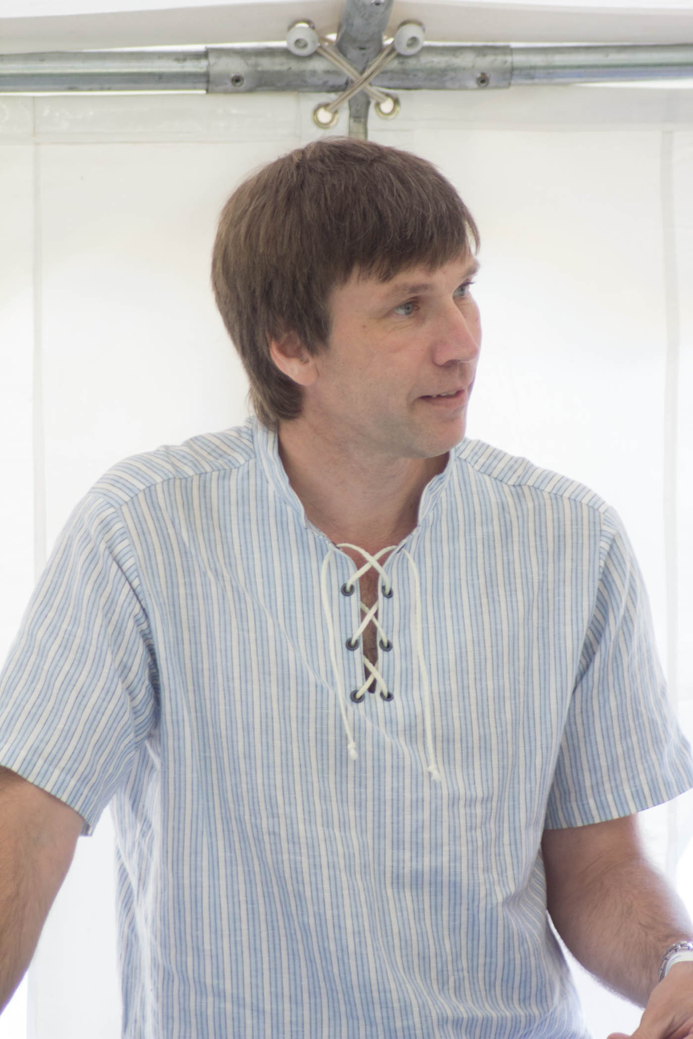 Sulev Valner arutlemas teemal "Eesti maaelu hääbumine ja elu koondumine linnadesse - kas paratamatu protsess?"